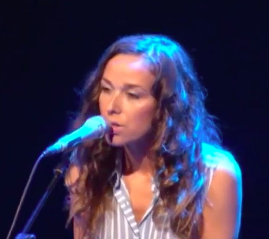 Aquest dissabte el Centre Cultural va tenir una convidada d'honor. Beth Rodergas va oferir un concert on va presentar Segueix-me el fil, el seu nou disc. Tot i que no va aconseguir fer ple, els que sí que hi van anar van poder gaudir de les noves cançons de l'artista.